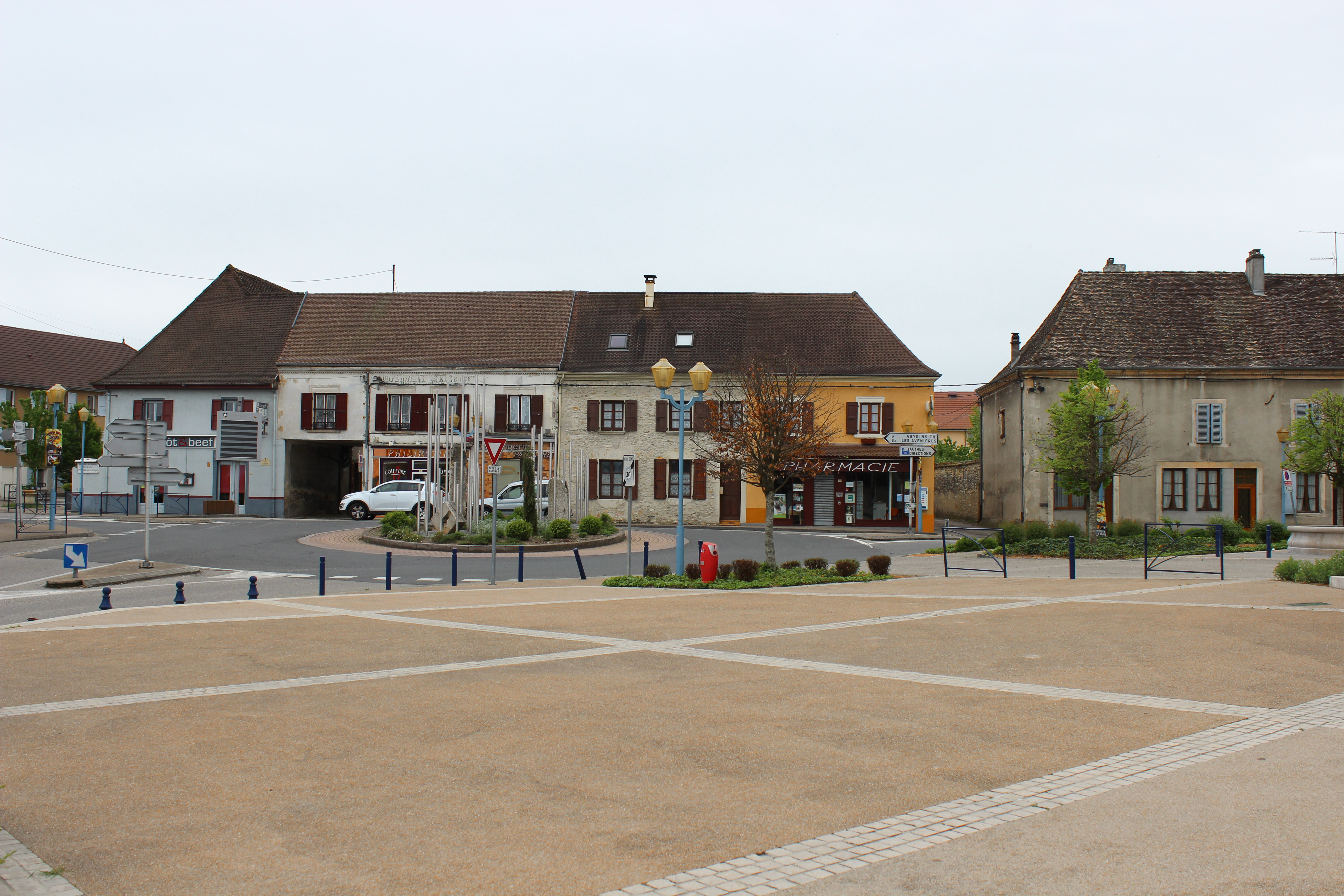 Place Clodomir à Vézeronce-Curtin.